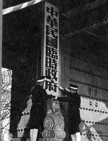 1937年（民国二十六年）12月14日，日本扶植的傀儡政权中華民國臨時政府在北京（原名北平）中南海怀仁堂成立。